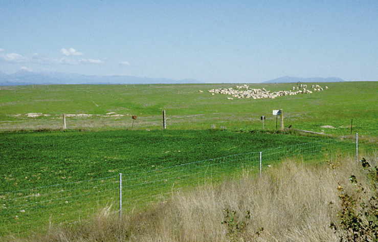 Guaret a Oropesa (comarca Talavera - Toledo), 10 de novembre de 2001.